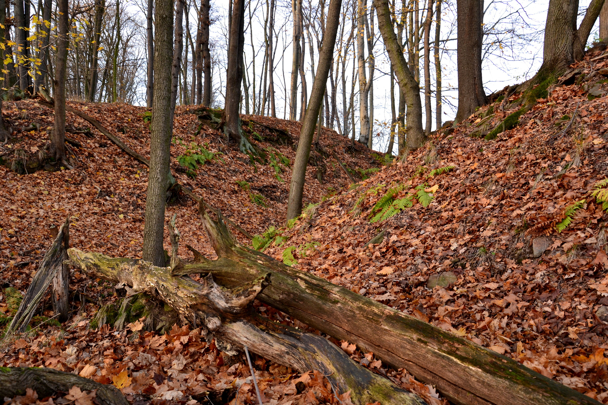 Najštejn - příkop okolo hradního jádra